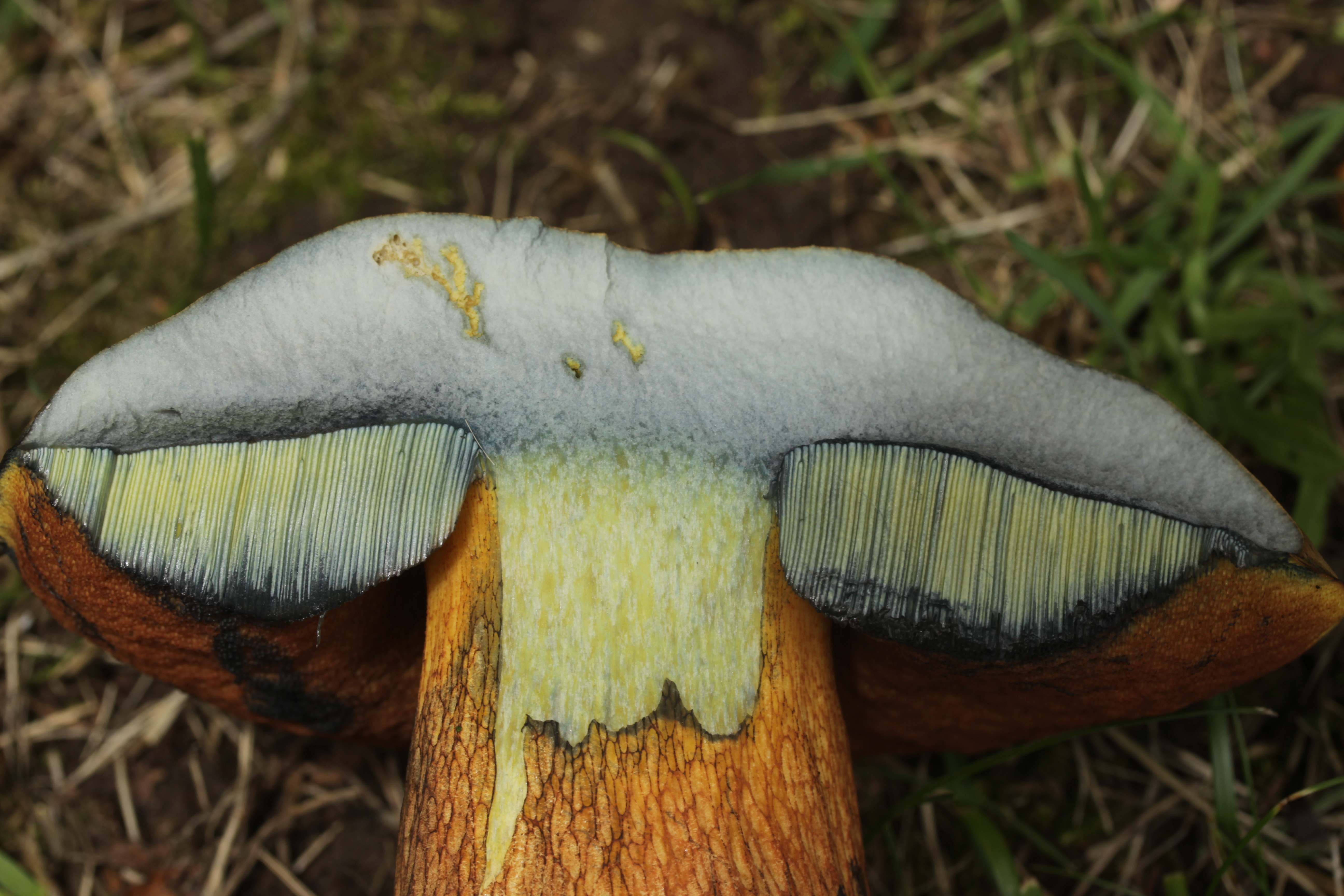 Lurid Bolete - Suillellus luridus